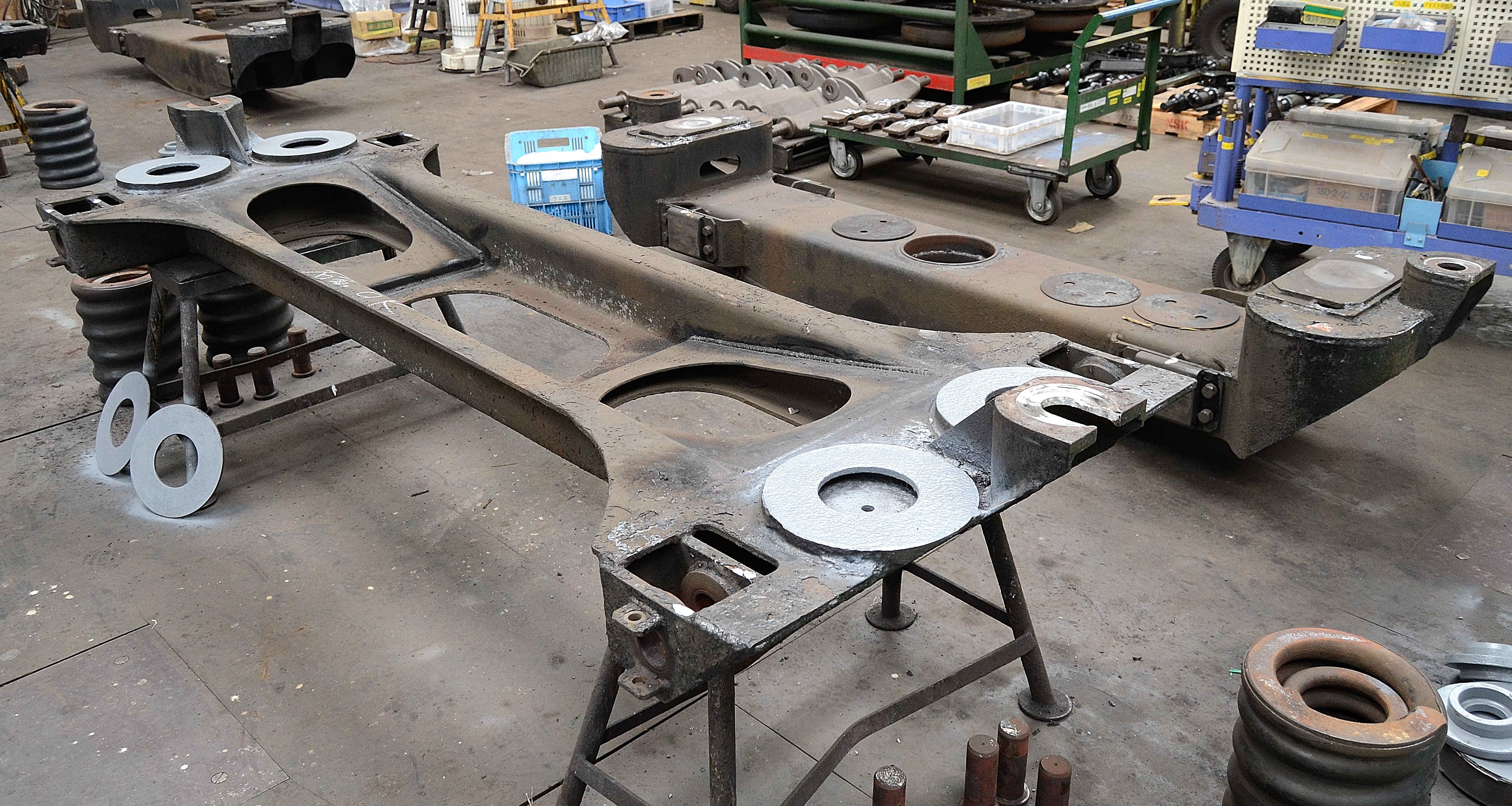 24系客車のカニ24のスイングハンガー式（揺れ枕吊り式）の台車に使用されている上揺れ枕（右側）と下揺れ枕（左側）。（2014年のJRおおみやふれあい鉄道フェアーでの工場開放にて撮影）